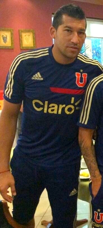 Portero Club Universidad de Chile